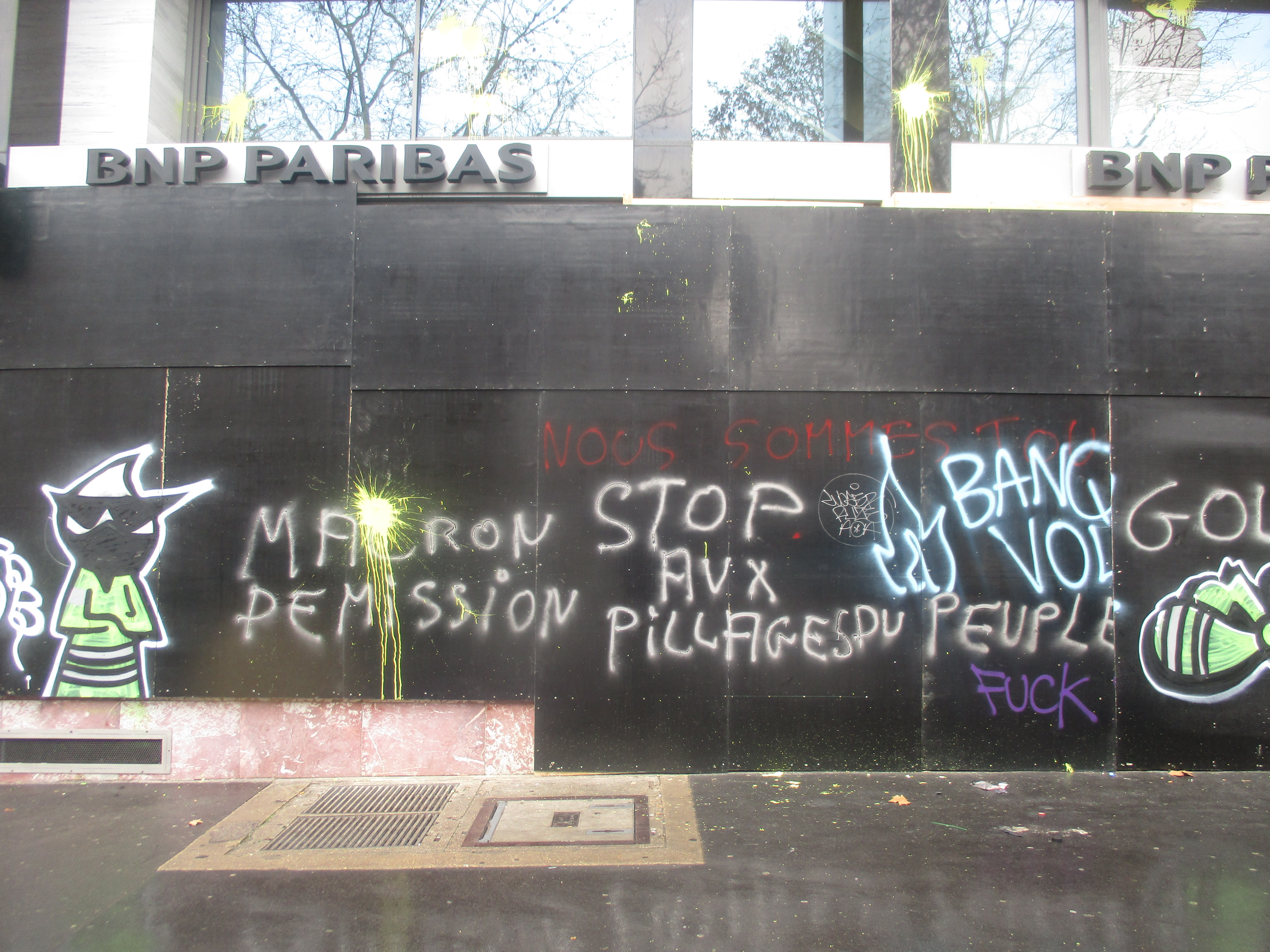 Banque vandalisée le 1er décembre 2018 avenue de la Grande-Armée à Paris.